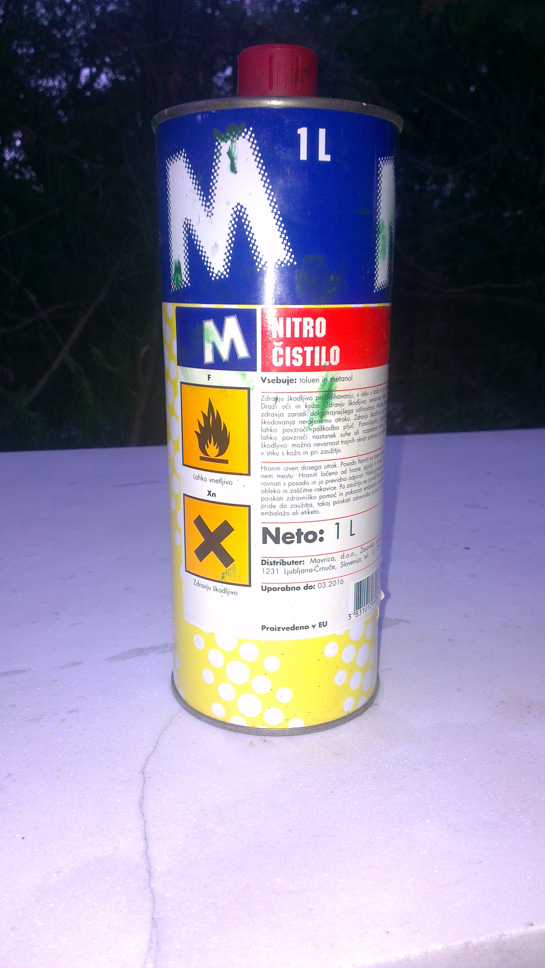 Na sliki je nitro čistilo, lastna slika